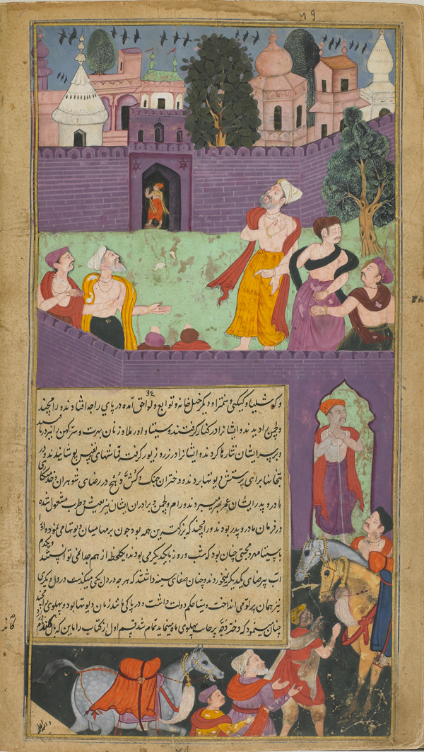 సారాంశం